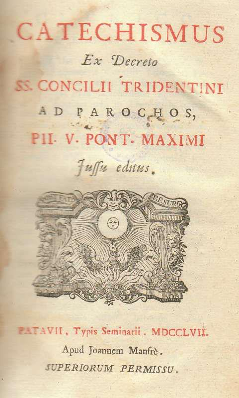 San Pio V, Catechismus ex decreto SS. Concilii Tridentini, Apud Joannem Manfrè Superiorum Permissu, 1757